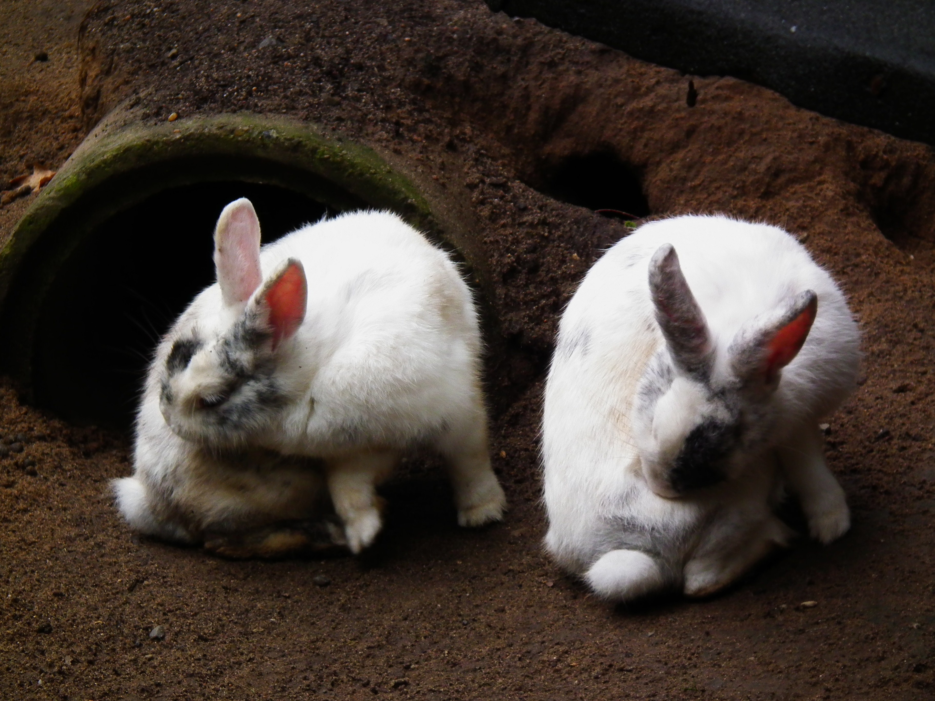 Rhönkaninchen, aufgenommen im Wildpark Alte Fasanerie in Klein-Auheim (Hessen, Deutschland)